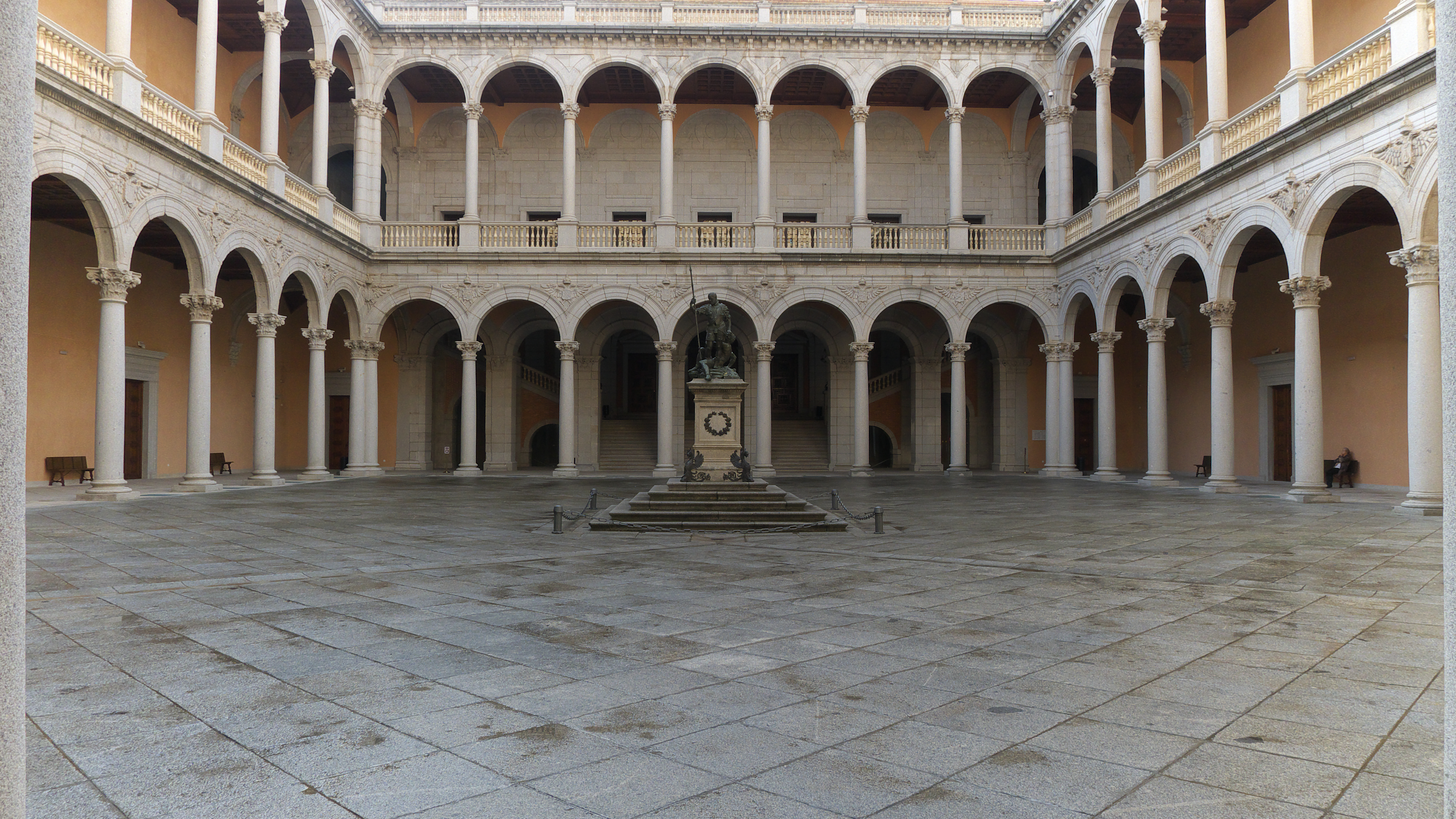 Alonso de Covarrubias, arquitecto real, traza el nuevo edificio renacentista, destinado a palacio imperial, alrededor de un grandioso patio, colaborando el prestigioso Francisco de Villalpando (1550)